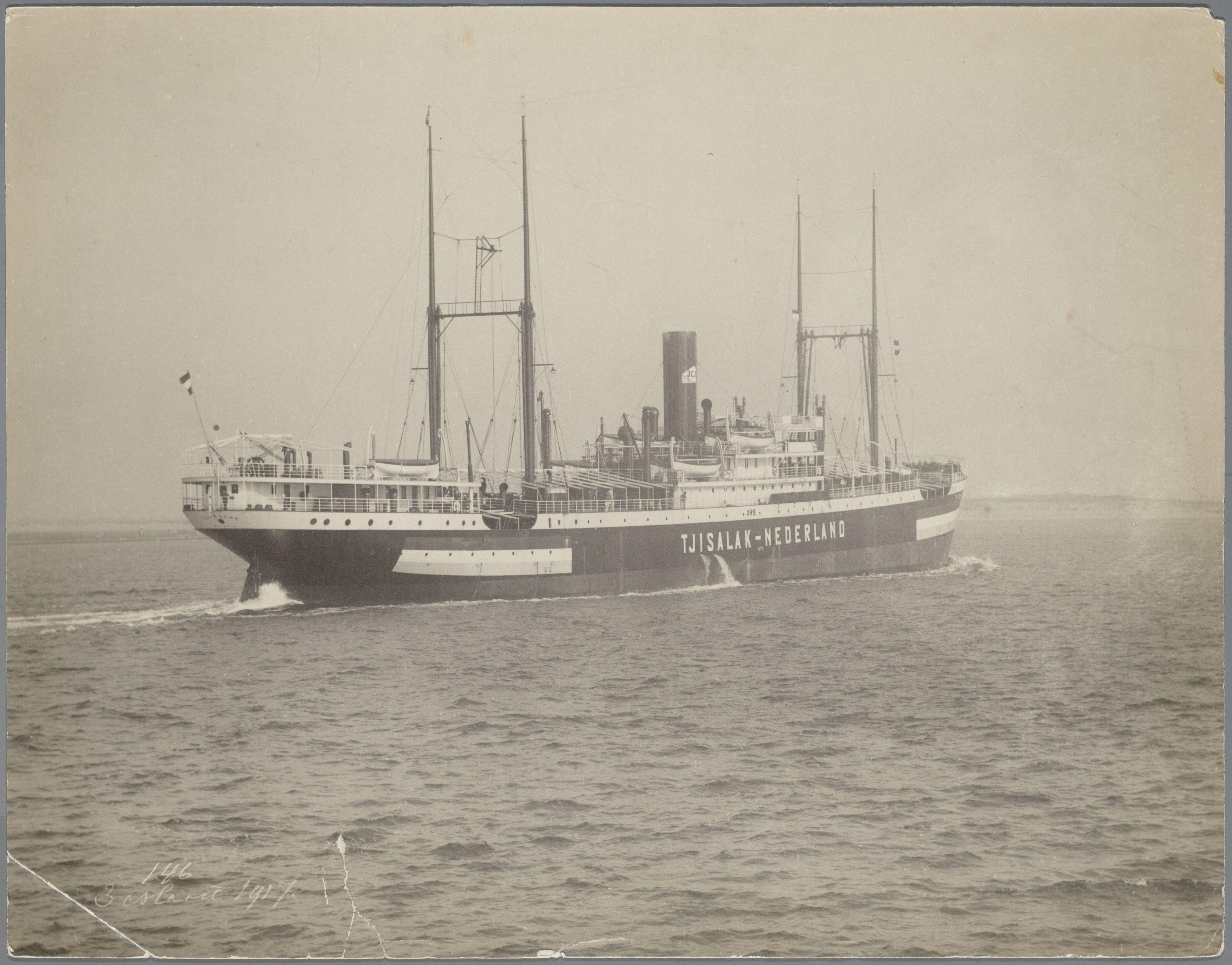 Beschrijving Het vrachtpassagiersschip ss. Tjisalak tijdens haar proeftocht Bouwnummer 146, gebouwd op de werf van de Nederlandsche Scheepsbouw Maatschappij (N.S.M.) in opdracht van de Java China Japan Lijn. Het schip is 26 maart 1944 afgevoerd nadat het door een Japanse onderzeeboot was getorpedeerd (in positie 2.30 Z.B./78.40 O.L.). Documenttype foto Vervaardiger Onbekend Anoniem Collectie Archief Nederlandse Dok- en Scheepsbouw Mij.: foto's Datering 3 maart 1917 Inventarissen Afbeeldingsbestand 010179000216